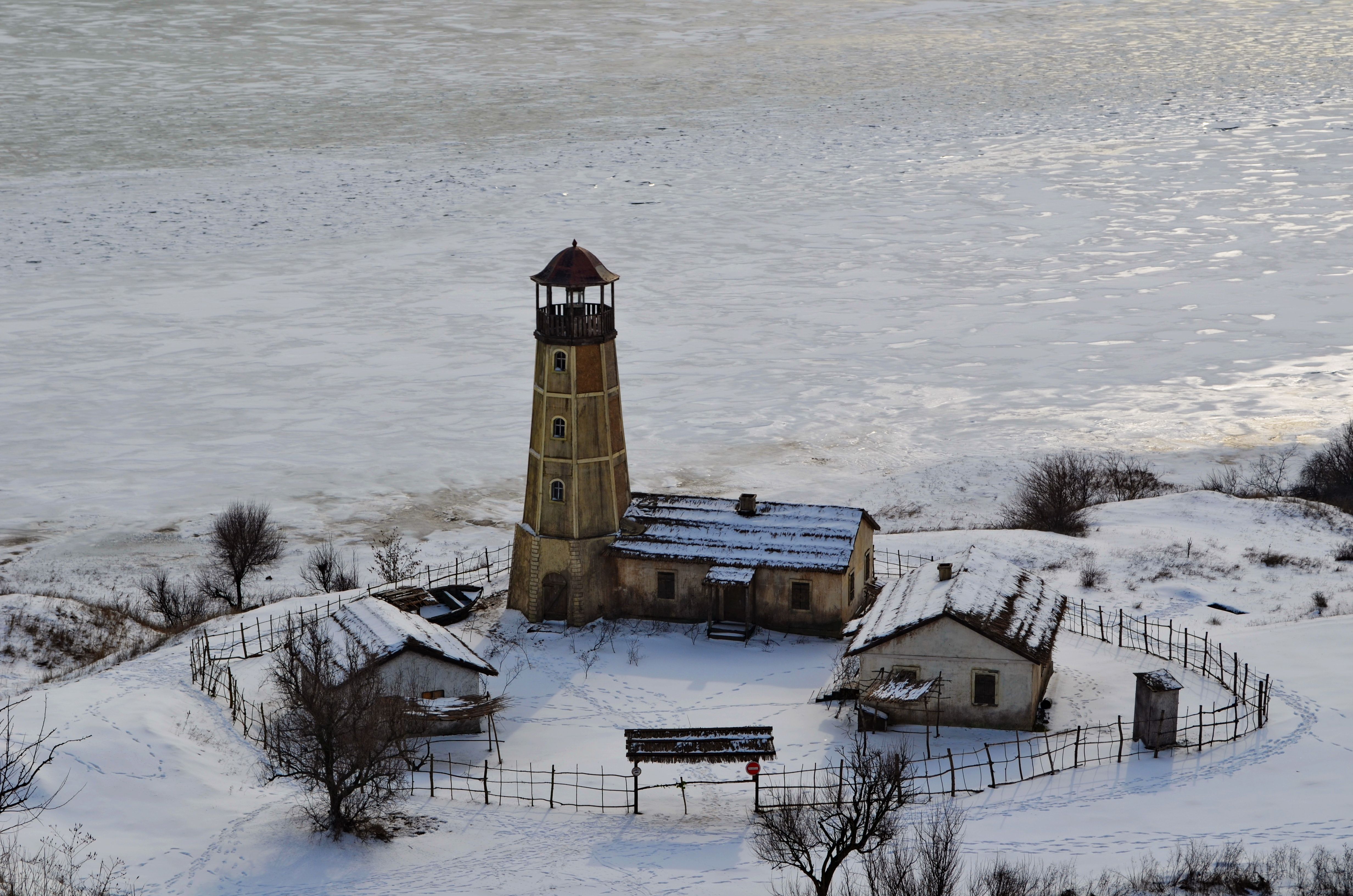 Декорации к фильму "Смотритель маяка" в Мержаново, Неклиновский район, Ростовская область